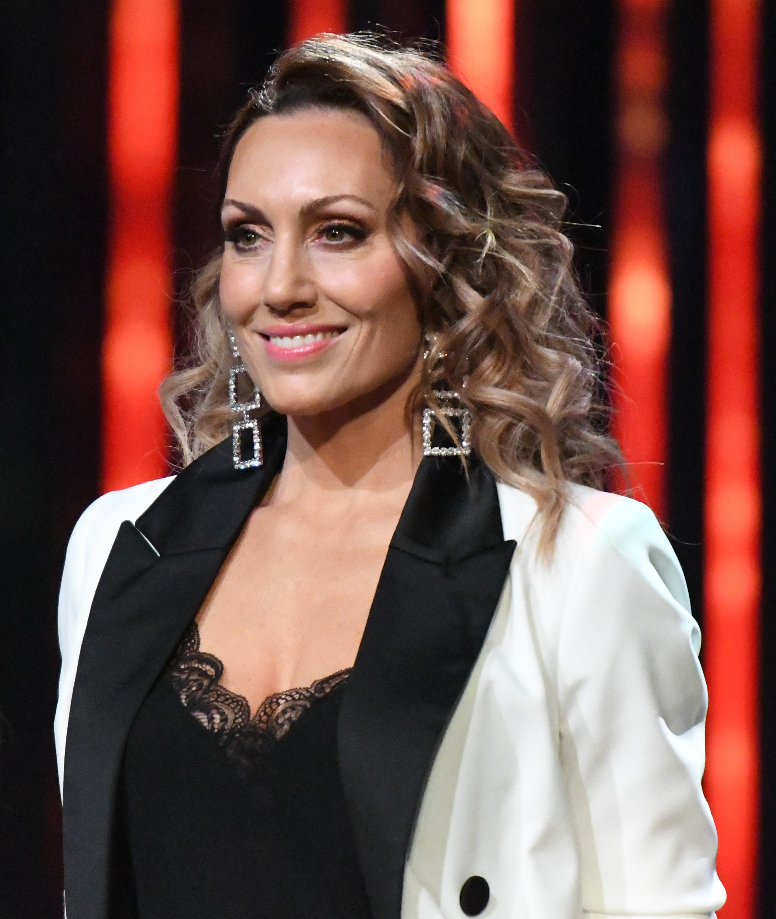 Melodifestivalen 2020, Malmö, Deltävling 4, Presskonferens fredag, Programledare, Lina Hedlund